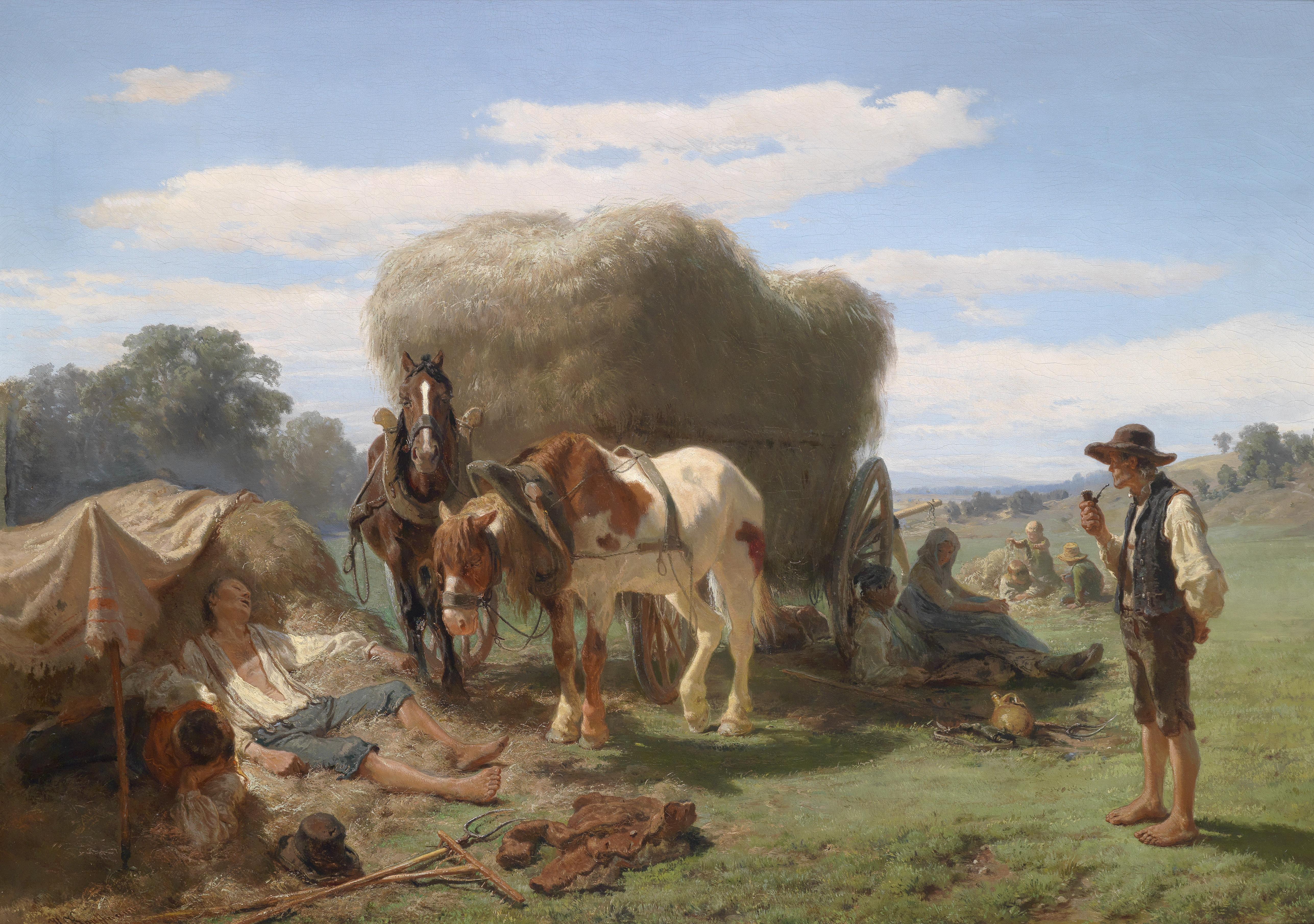 Rast bei der Ernte, signiert H. Kauffmann, Öl auf Leinwand, 90 x 130 cm